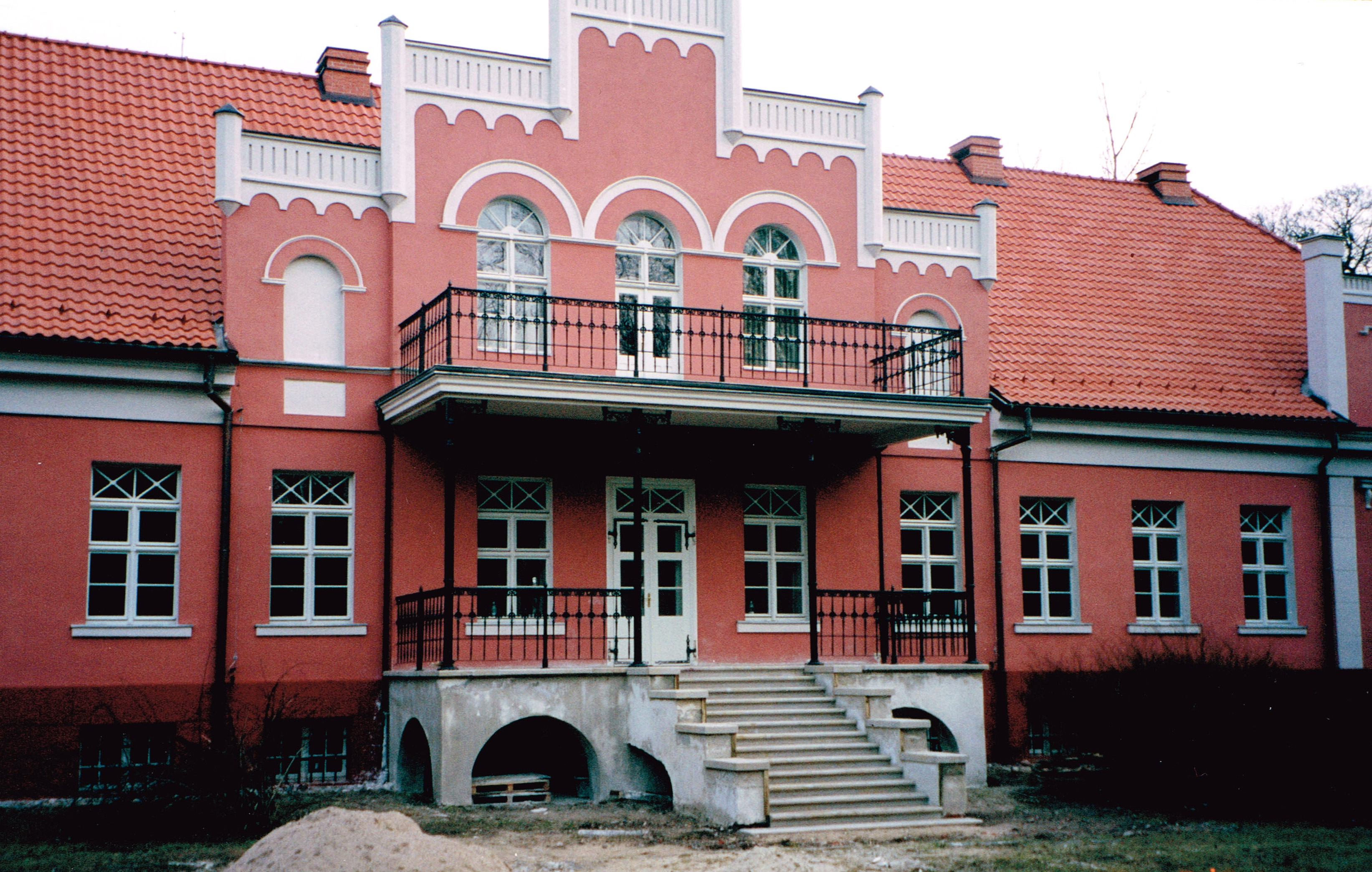 Pałac po restauracji i adaptacji na muzeum, stan w 2001 r.